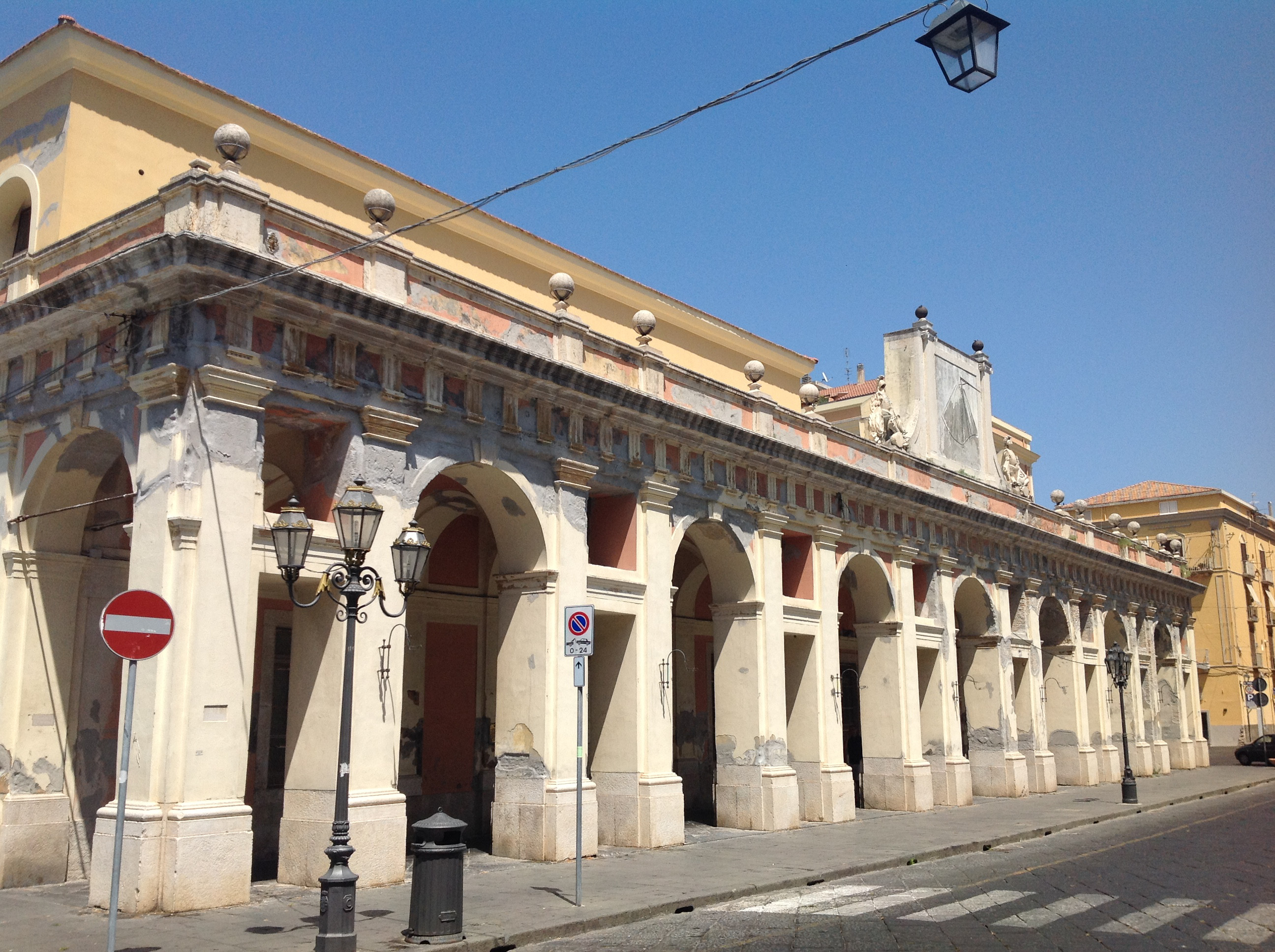 La facciata della Gran Guardia.